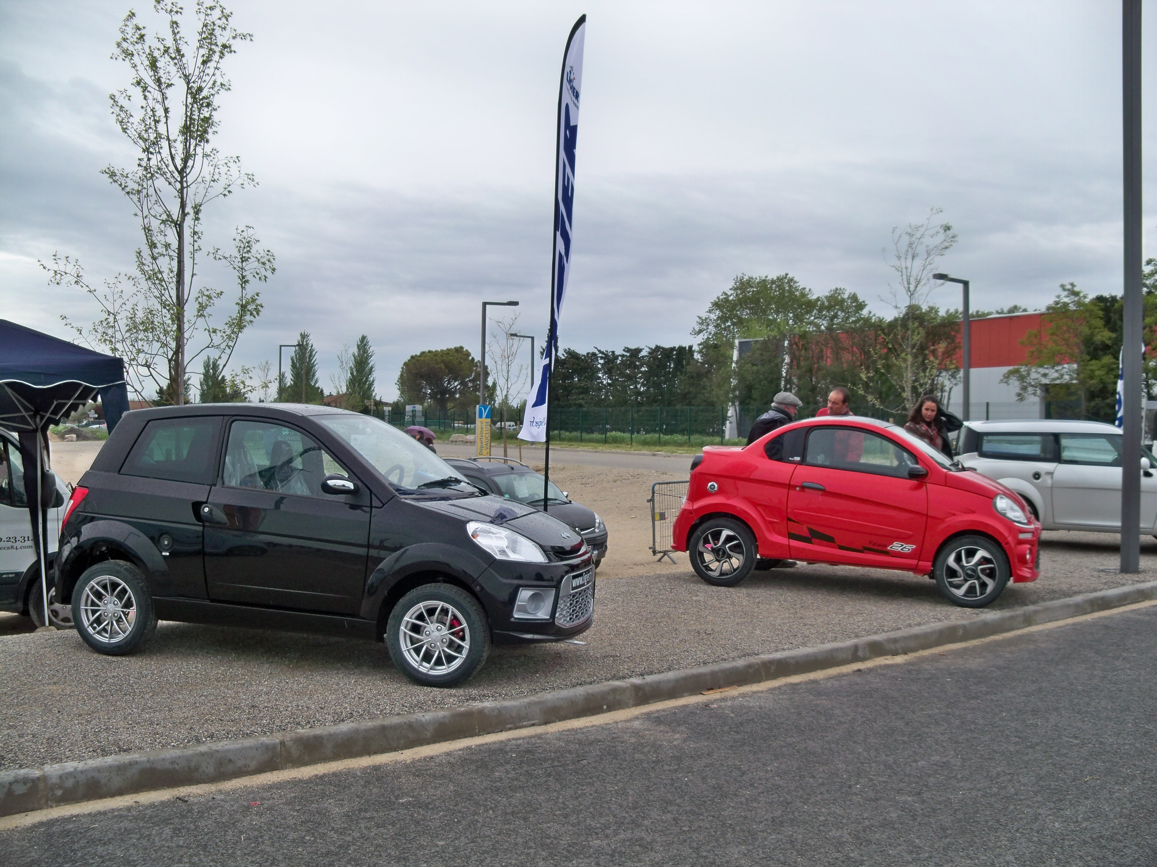 Foire d'Avignon : véhicules Ligier